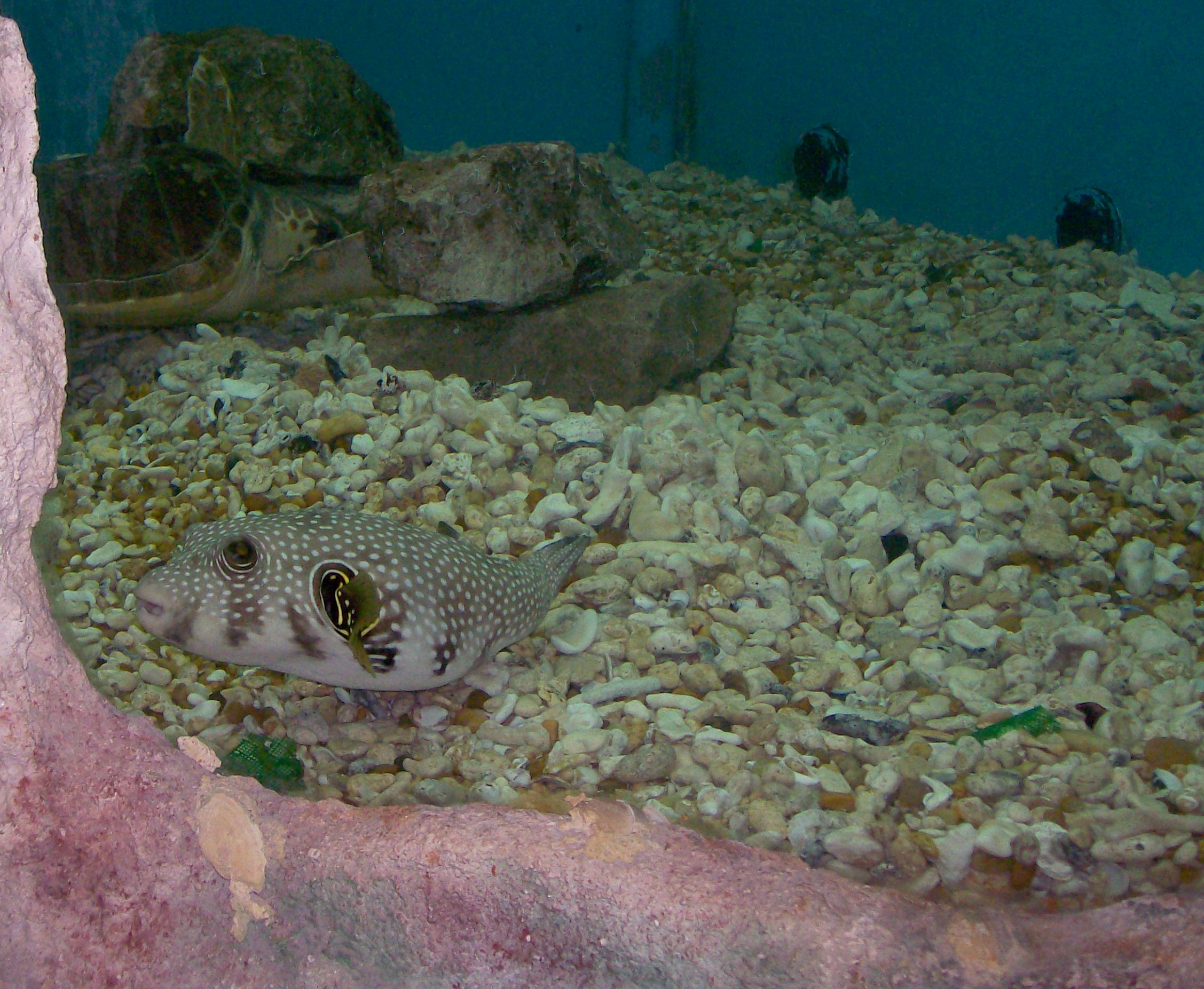 Akwarium morskie w Egipcie. Fotografia wykonana przez mojego ojca.